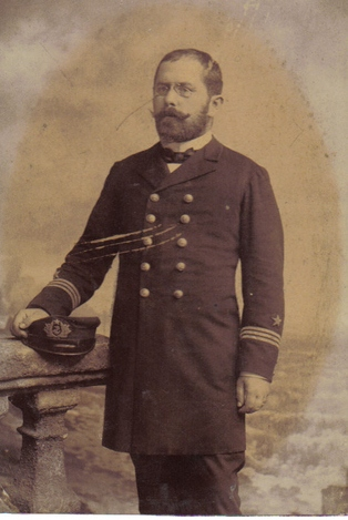 Vicealmirante Francisco Nef Jara (Valparaíso, 3 de agosto de 1863 - † Valparaíso, 9 de junio de 1931) fue un oficial naval chileno y miembro de la Junta de Gobierno que gobernó Chile entre 1924 y 1925.